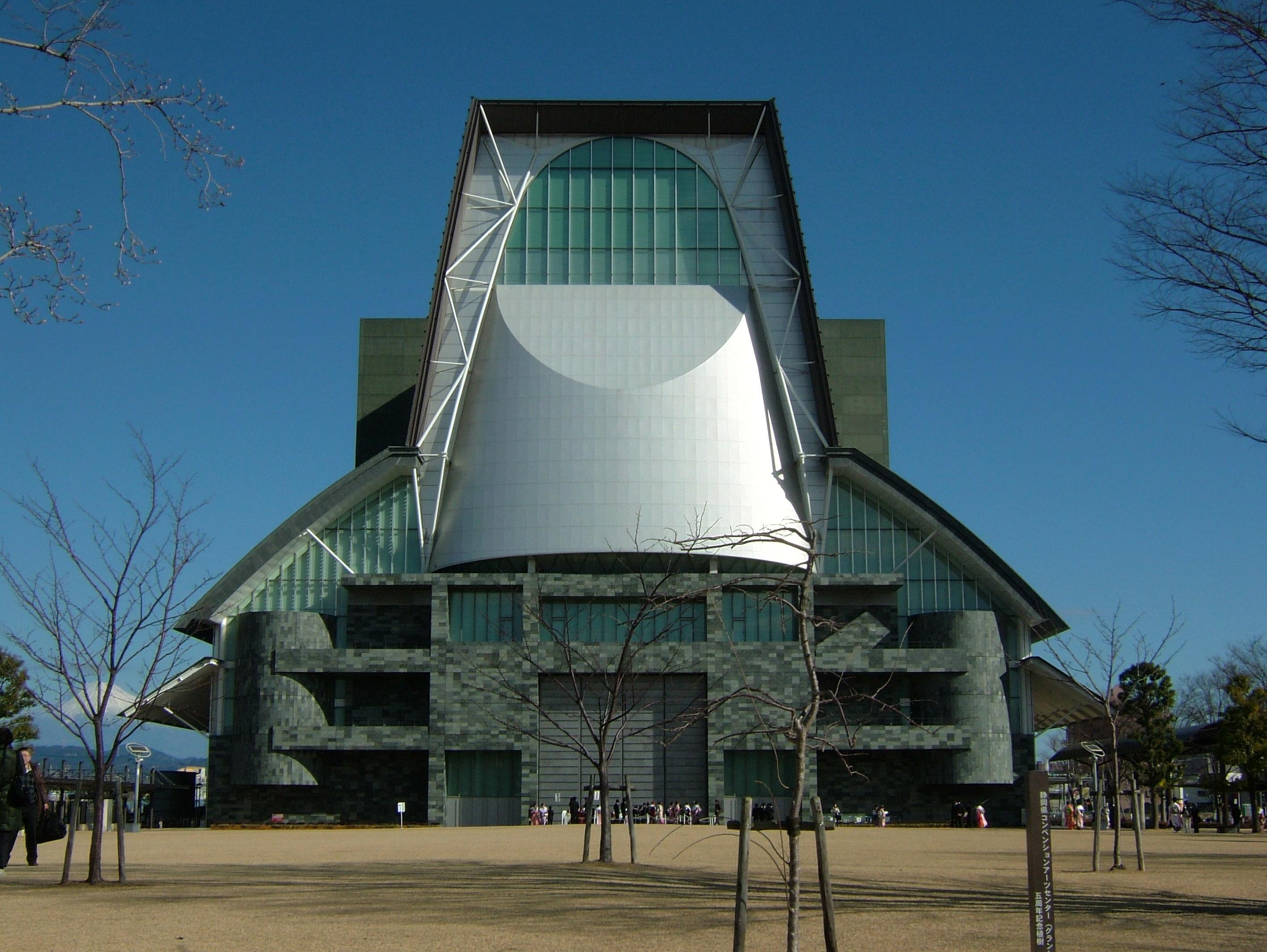 グランシップファサード